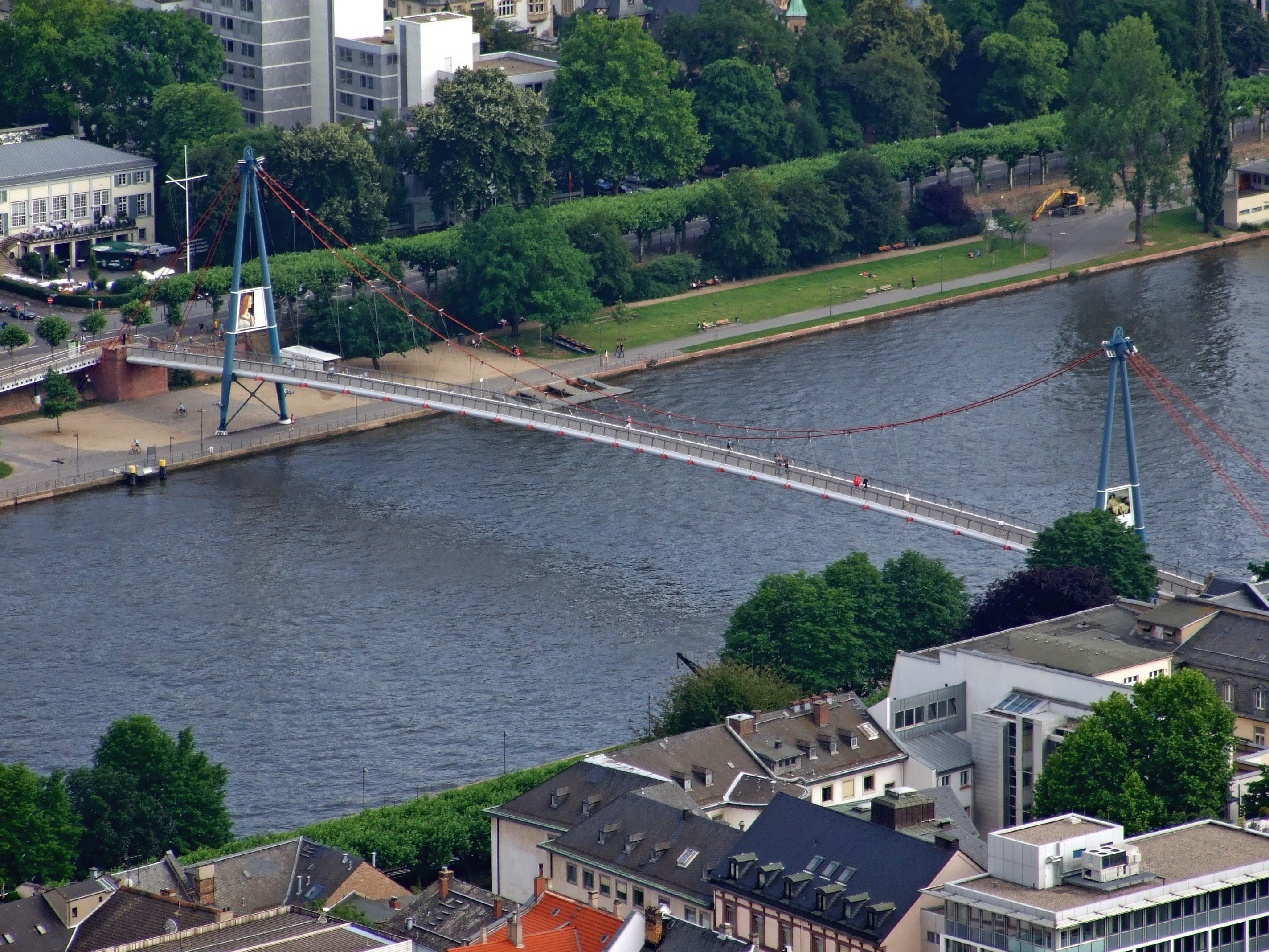 Der Holbeinsteg in Ffm